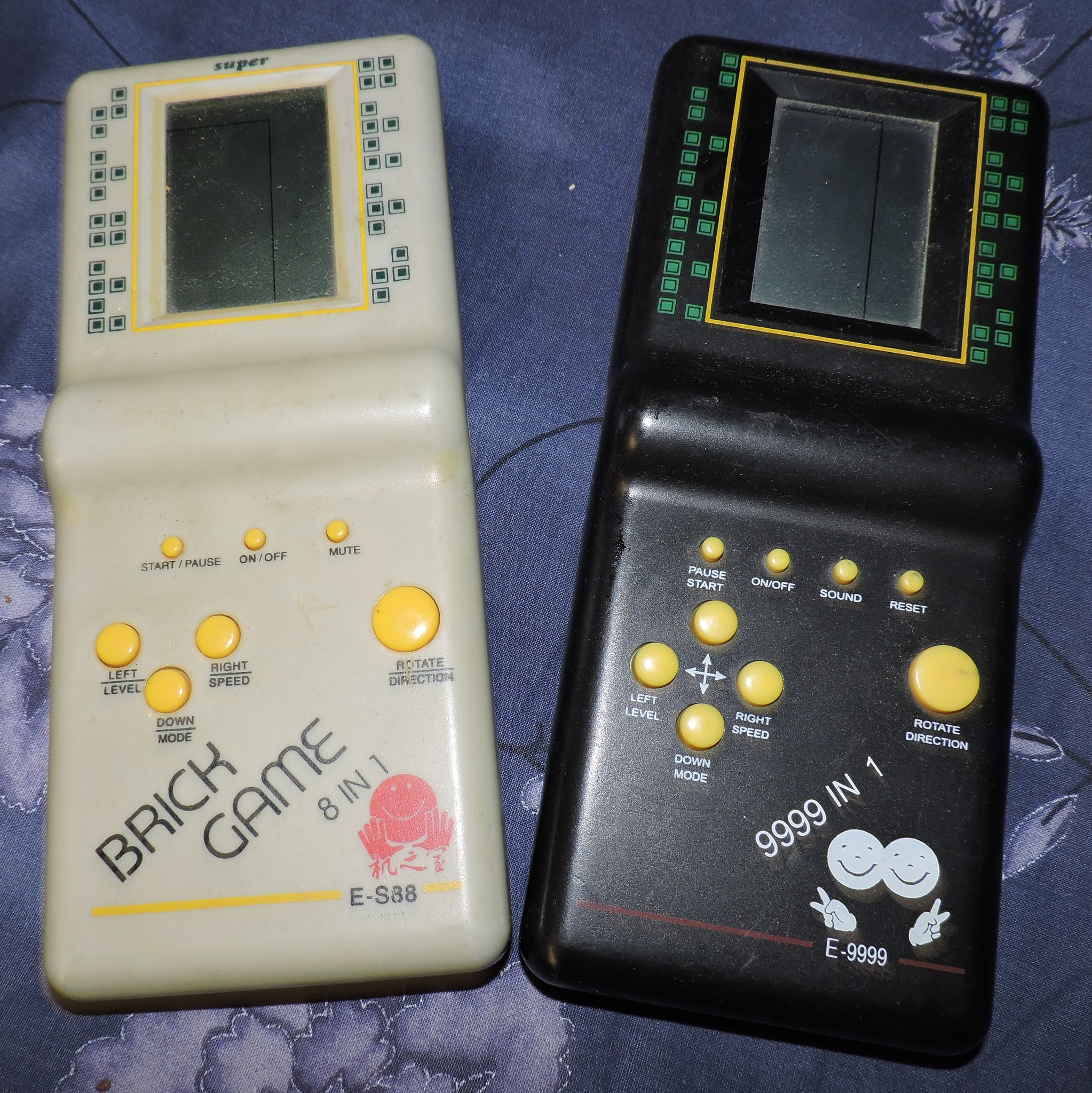 Тетрисы типа «Brick Game»